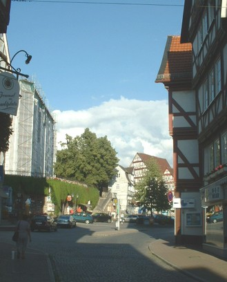 Marktplatz